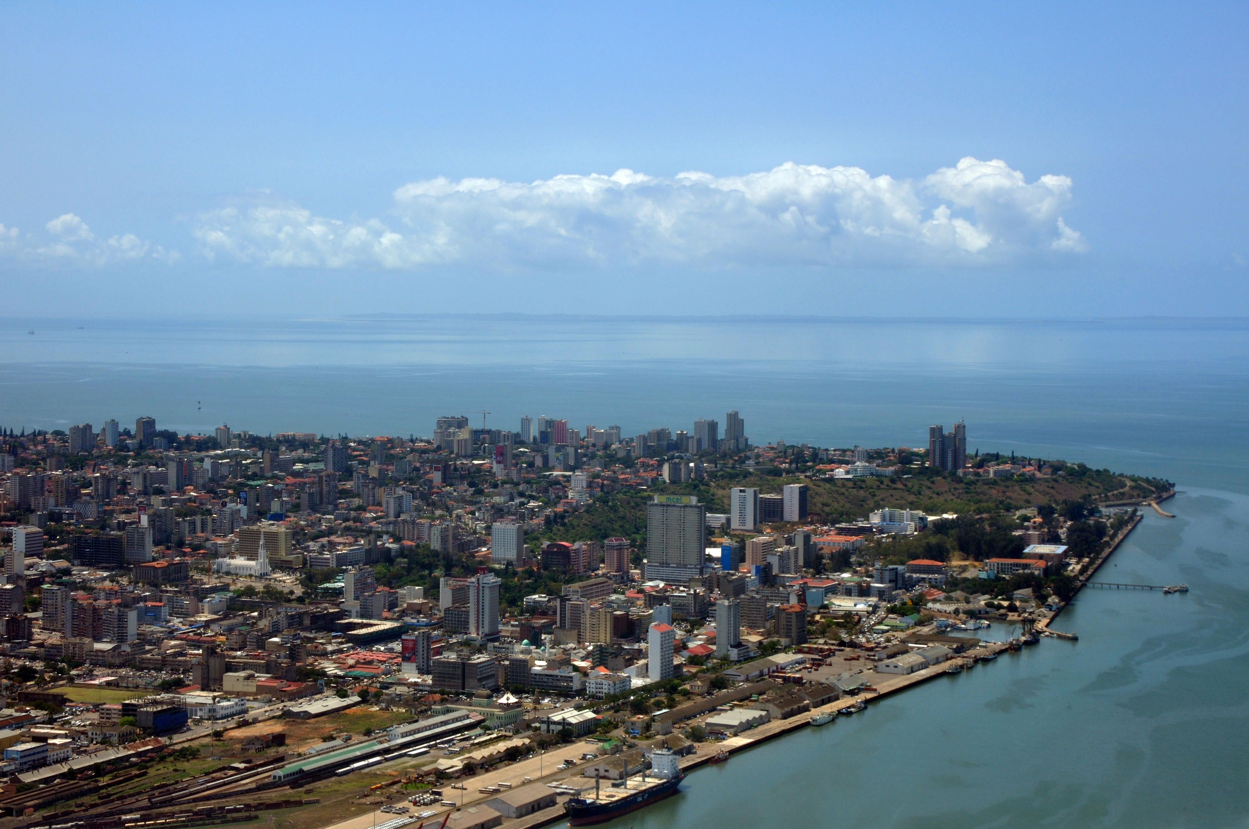 Mozambique, approach into Maputo